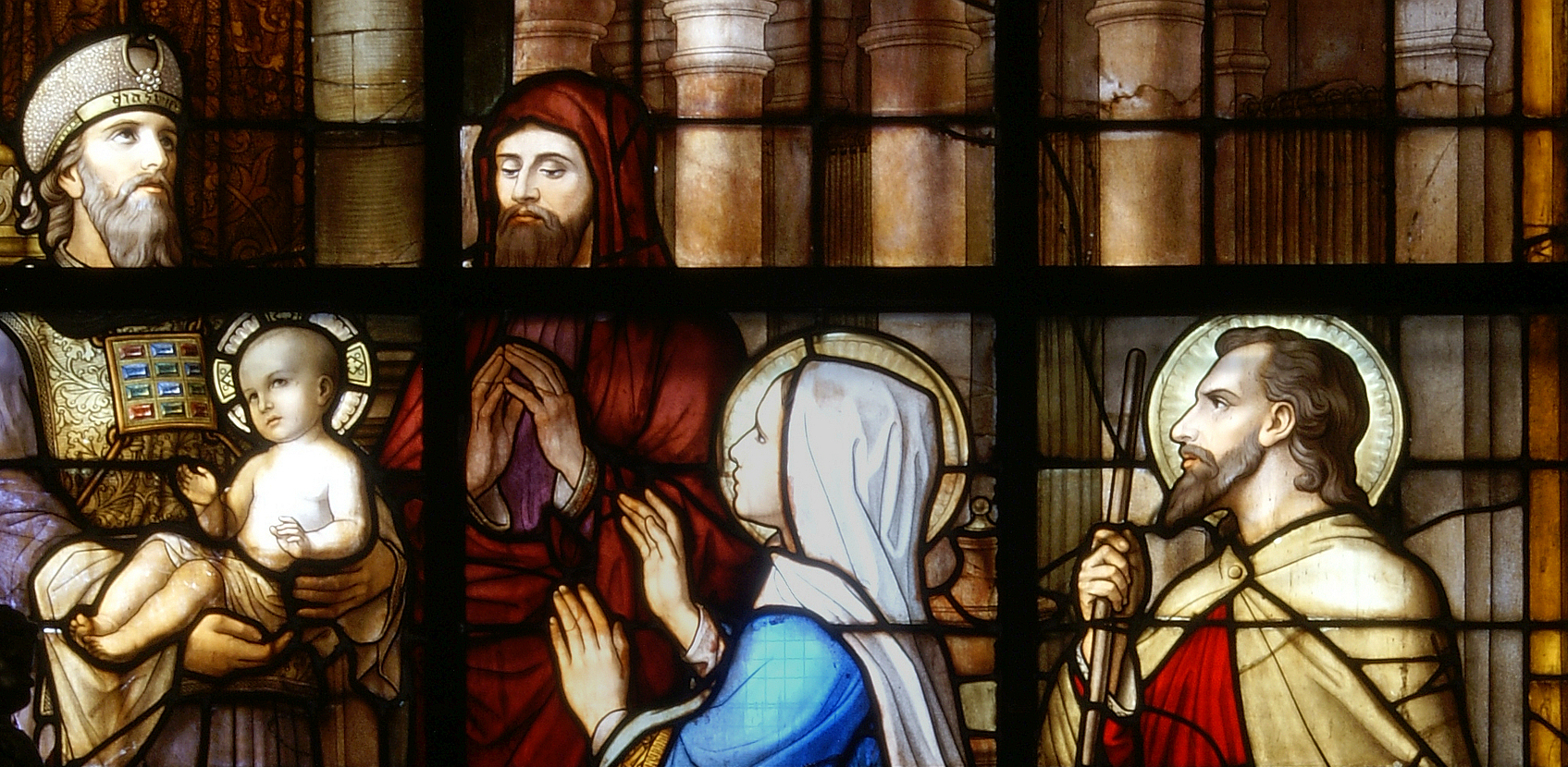 Glasraam (detail) in de koorommegang, gemaakt door J.B. Capronnier, anno 1884. Gift van mevrouw Henrica Van Genechten.